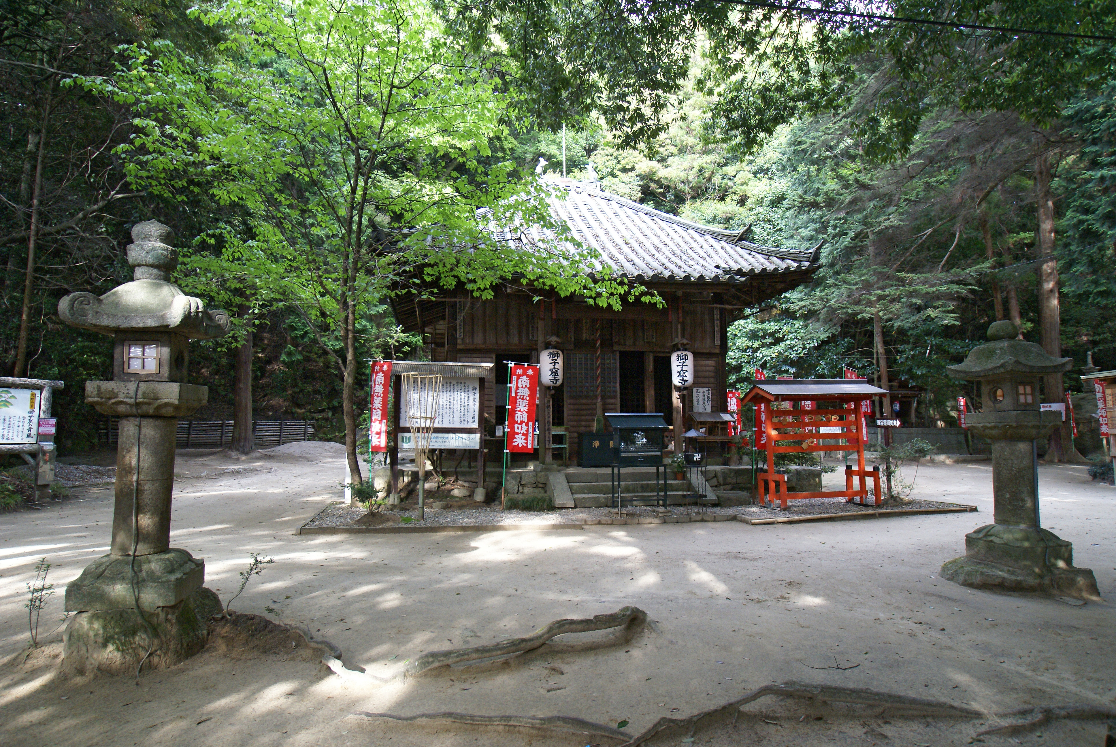 Shishikutsuji in Katano, Osaka prefecture, Japan